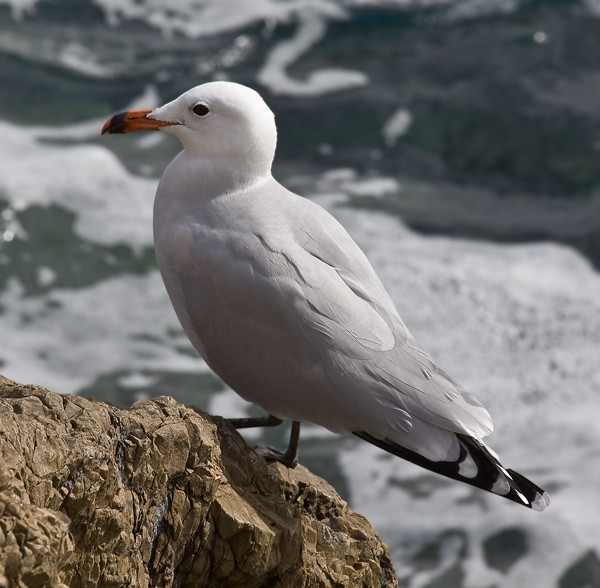 Korallenmöwe an Felsküste in Mallorca.